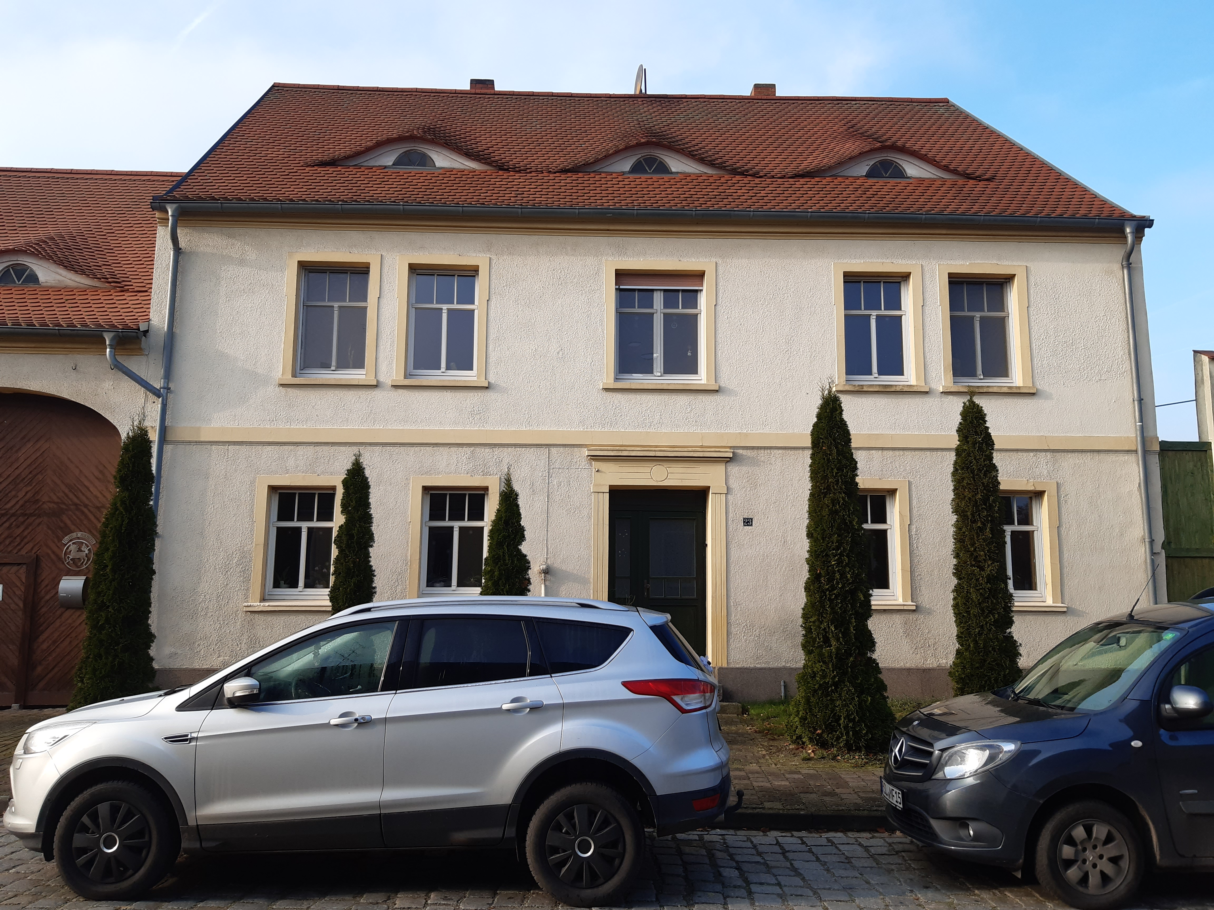 Wohnhaus